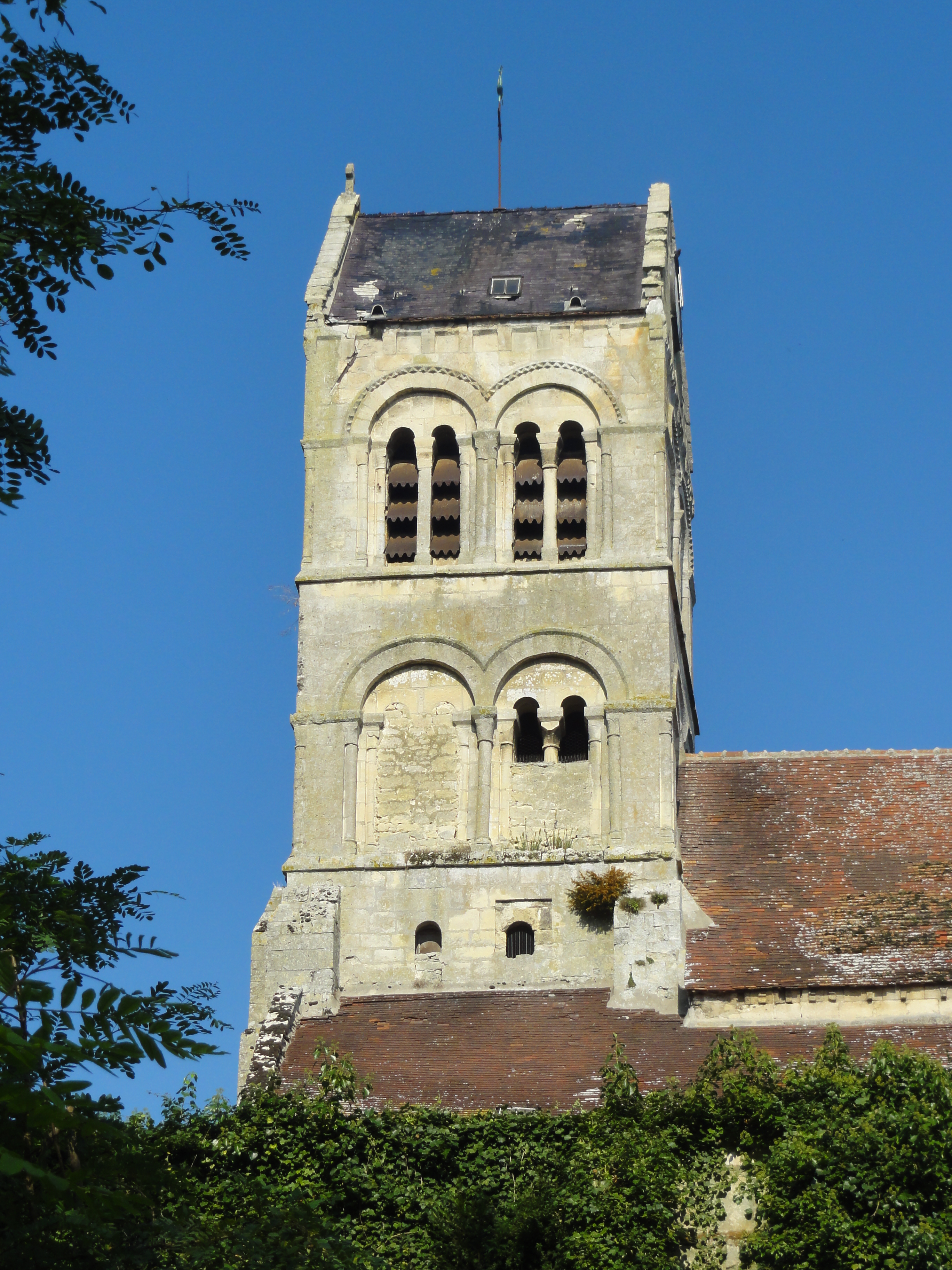 Église Saint-Rémi d'Orrouy - voir titre.